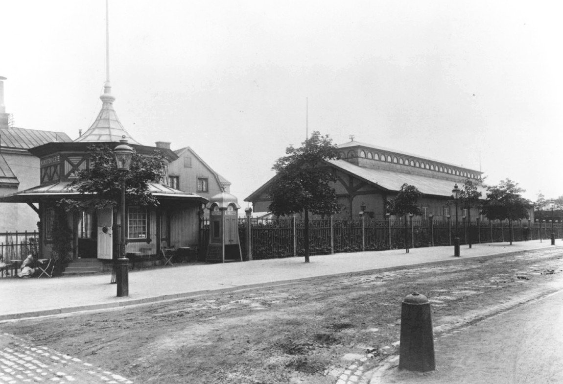 Bebyggelsen i kvarteret Fyrkanten (dagens Konsthallen) där Liljevalchs konsthall byggdes 1914-1916